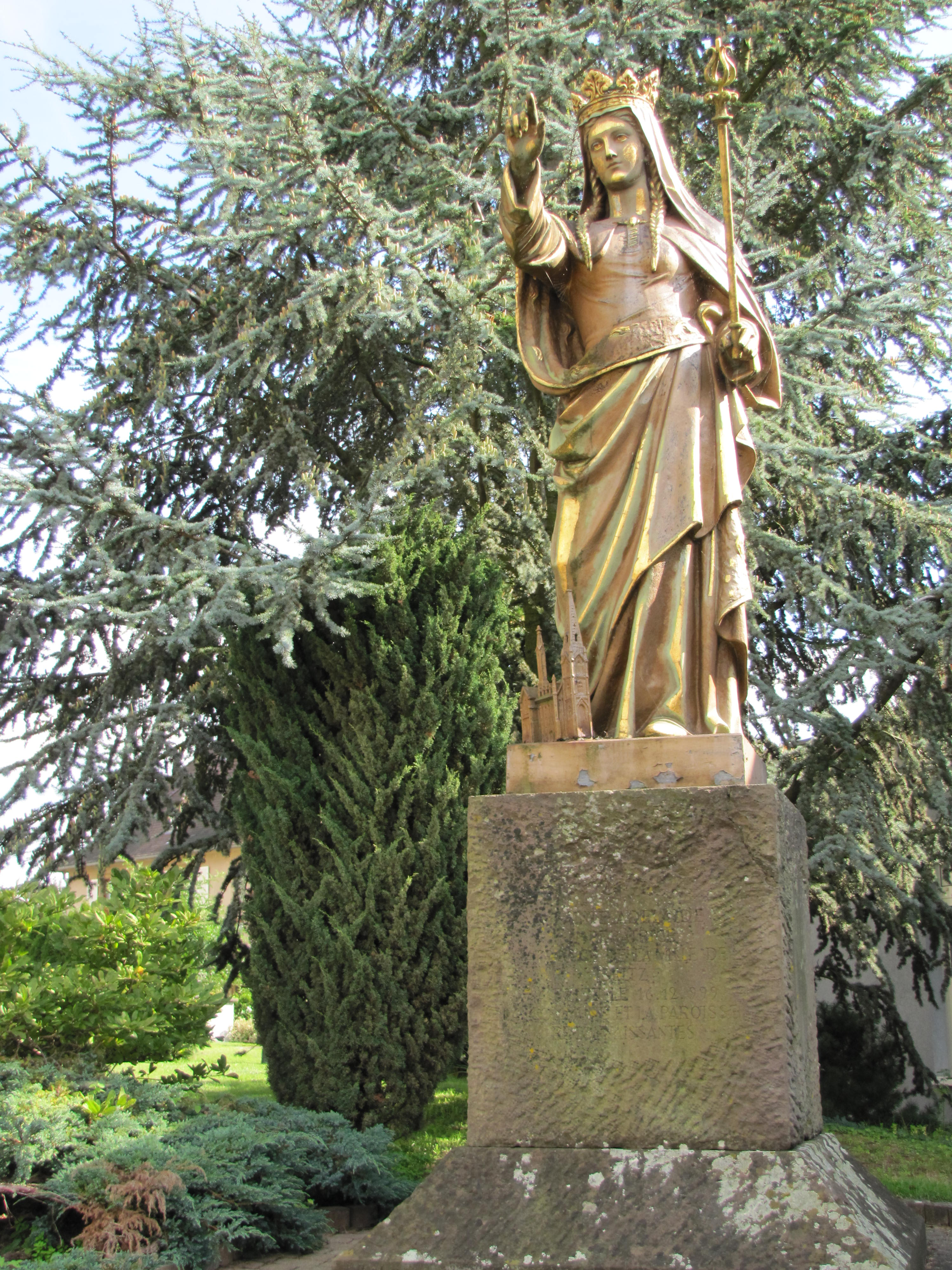 Alsace, Bas-Rhin, Seltz, Statue en bronze de Saint-Adelaïde, fondatrice de l'Abbaye de Seltz aujourd'hui disparue.